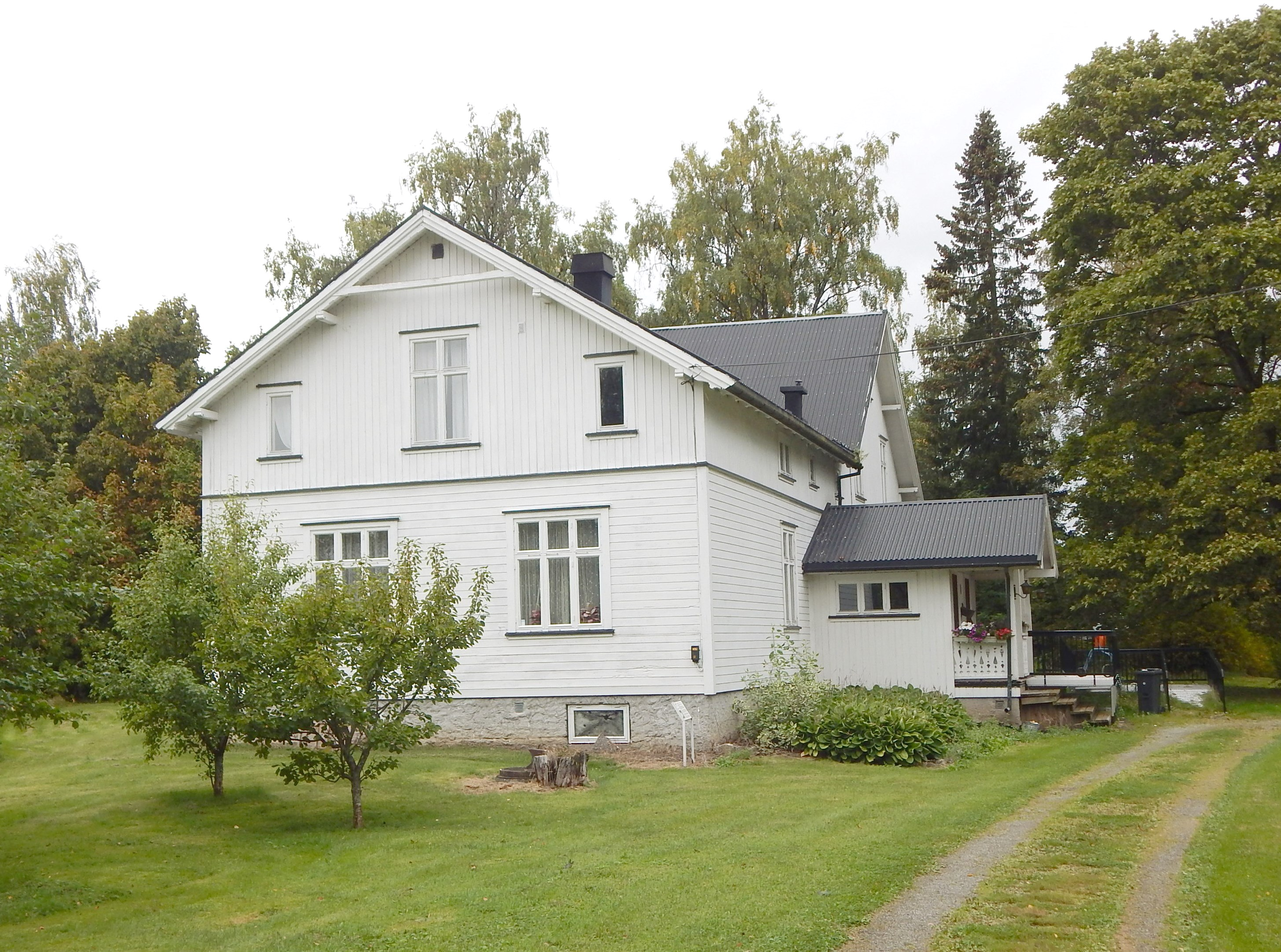 Dystingbo i Vang